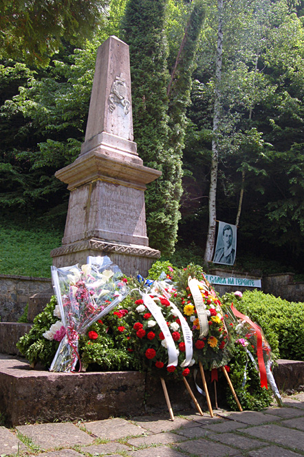 Monument to Benkovski Ribaritsa, Lovech Province, Bulgaria